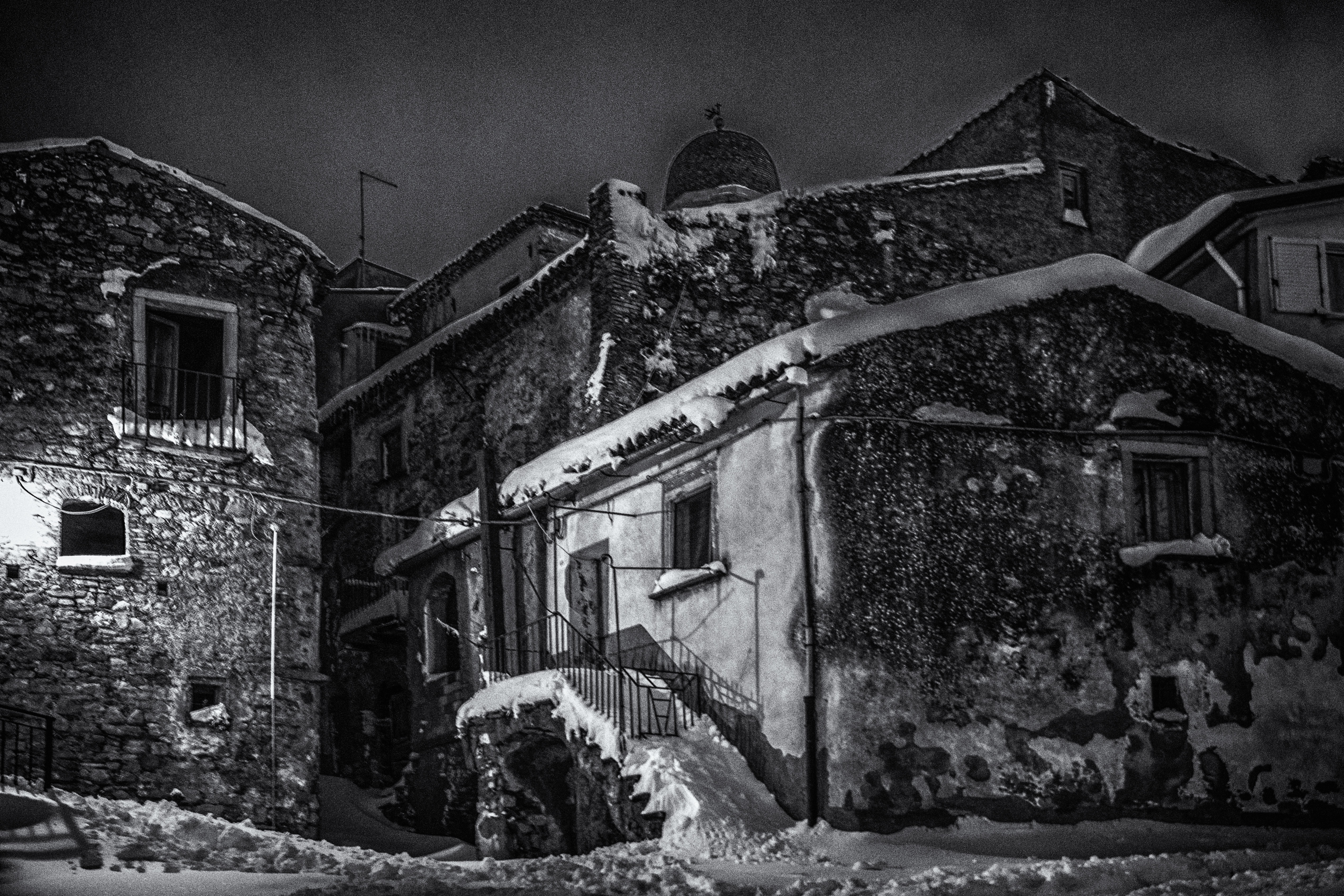 Vico tutti i Santi